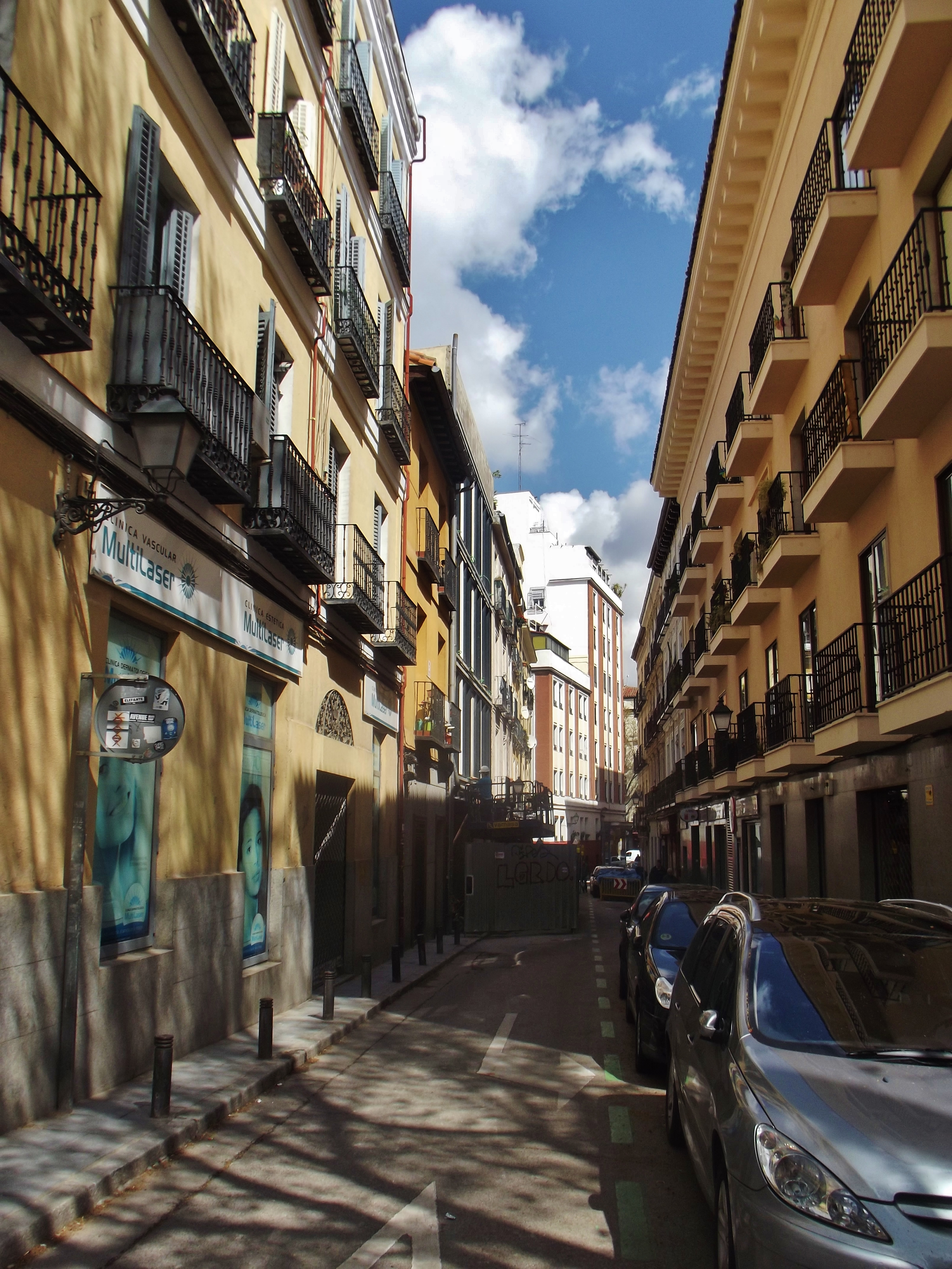 Calle del Marqués de Toca, Madrid.